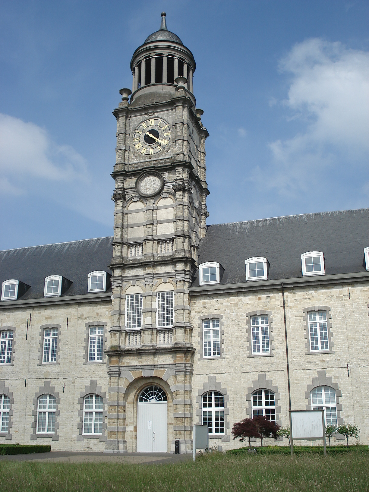 Hemiksem (bij Antwerpen), Sint-Bernardusabdij, westgevel, toren (begin 18de eeuw).